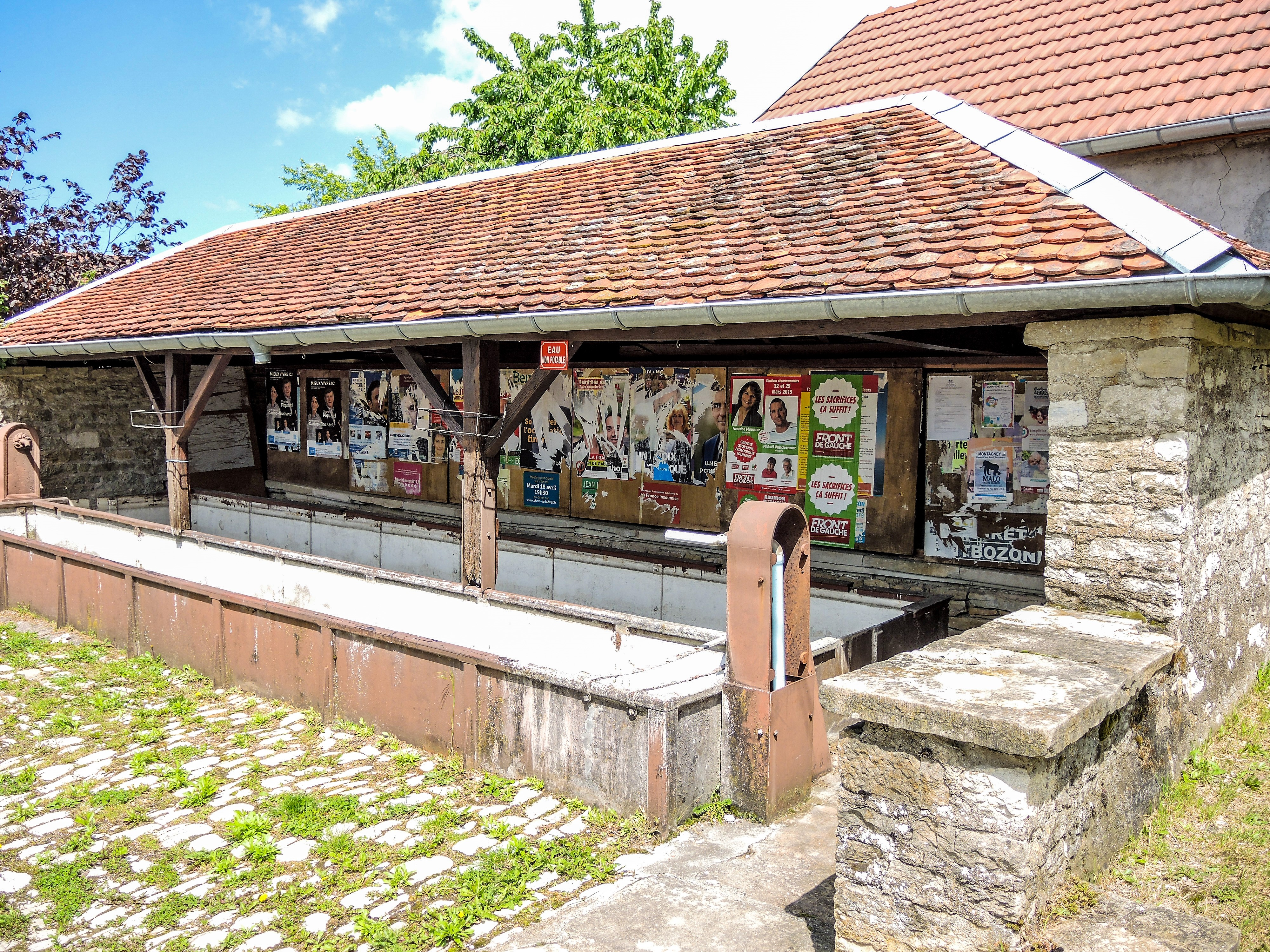 Fontaine-lavoir-abreuvoir couverte